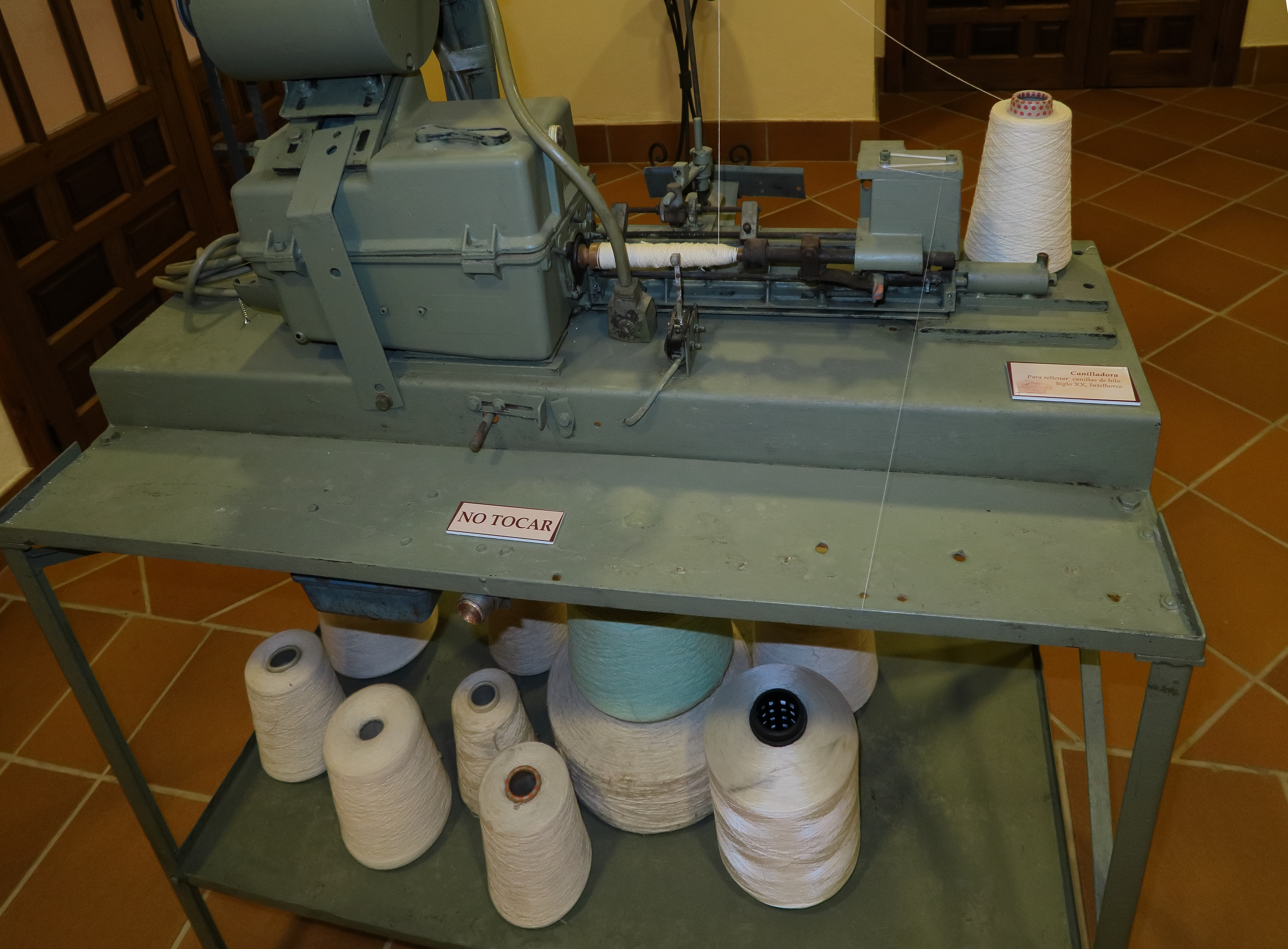 Canilladora máquina para rellenar canillas de hilo, siglo XX, de Intelhorce, exposición textil en el Complejo Educacional El Henchidero (Ayuntamiento de Antequera)